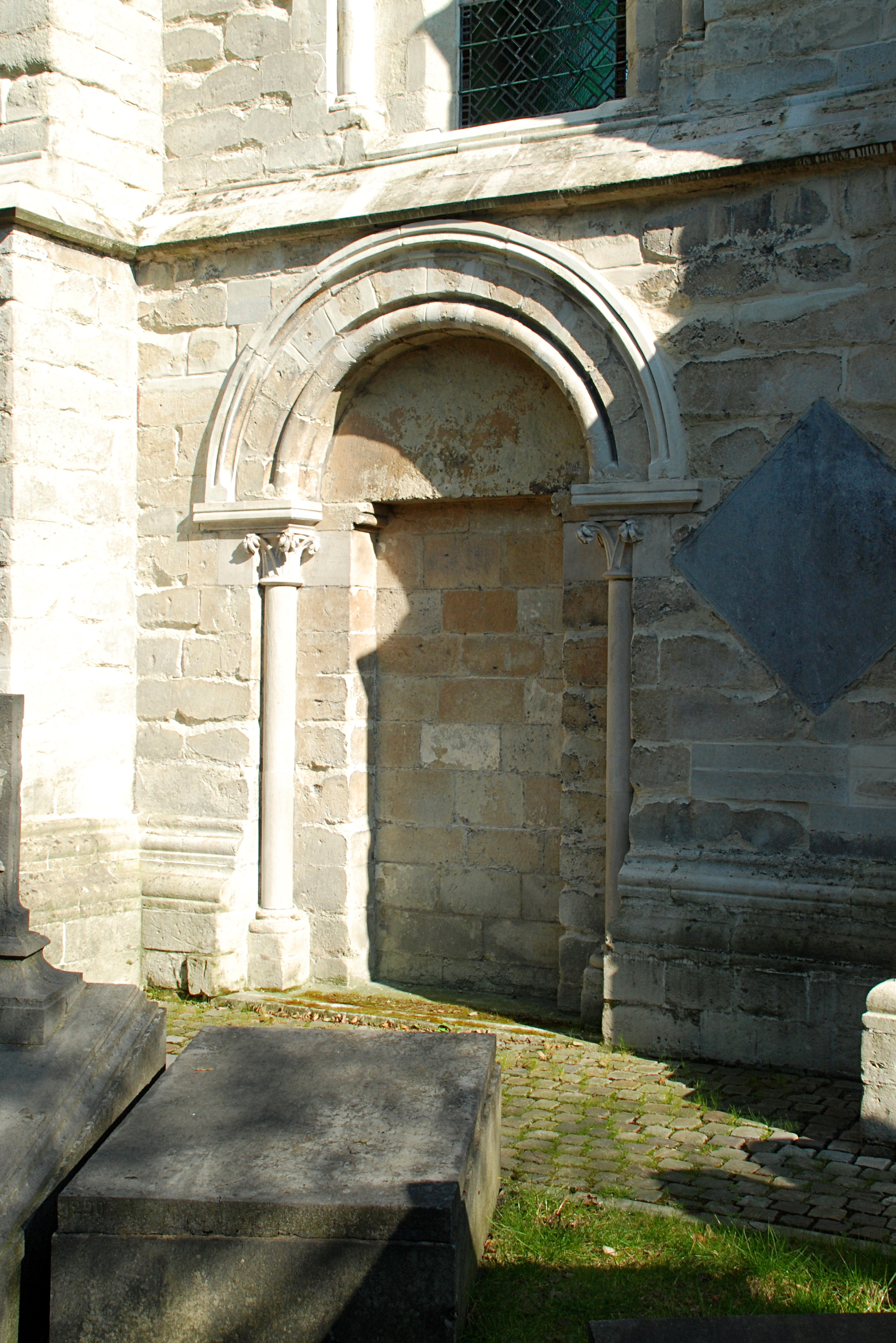 Belgique - Bruxelles - Ancienne église Notre-Dame de Laeken (gothique 13e siècle)